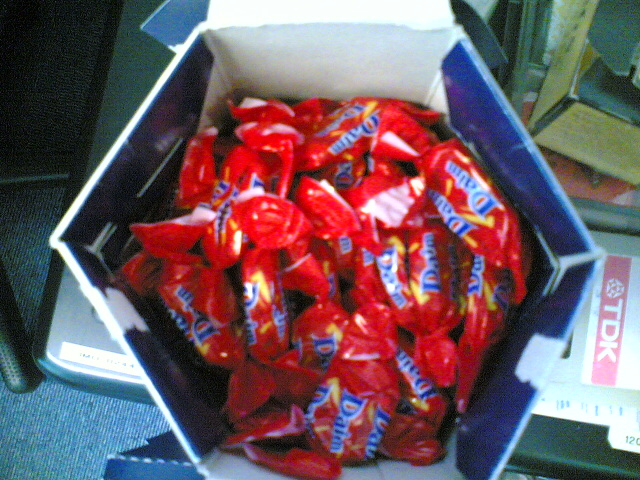 Drageias de Daim. Daim drops.